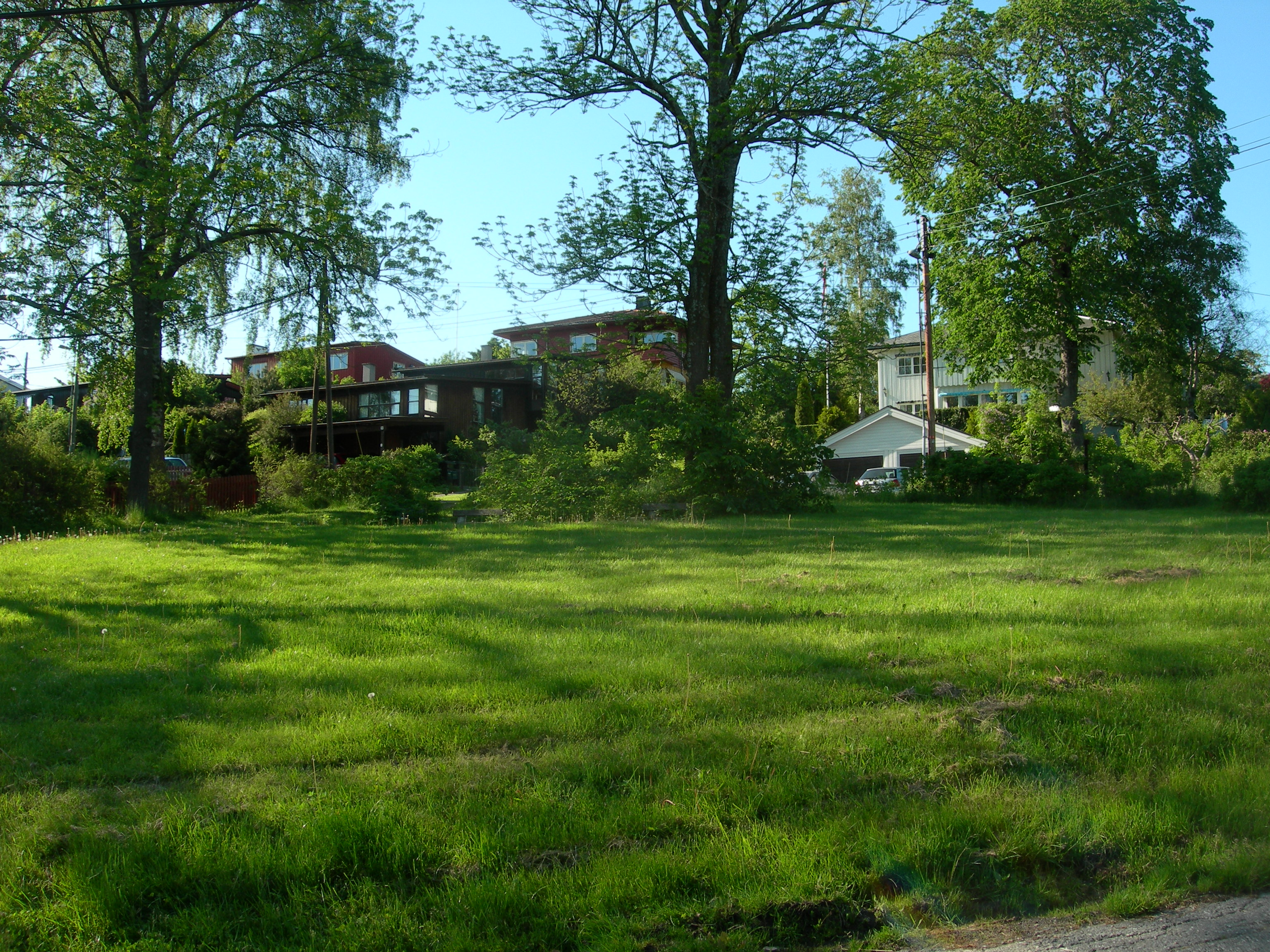 Krokusveien i Oslo